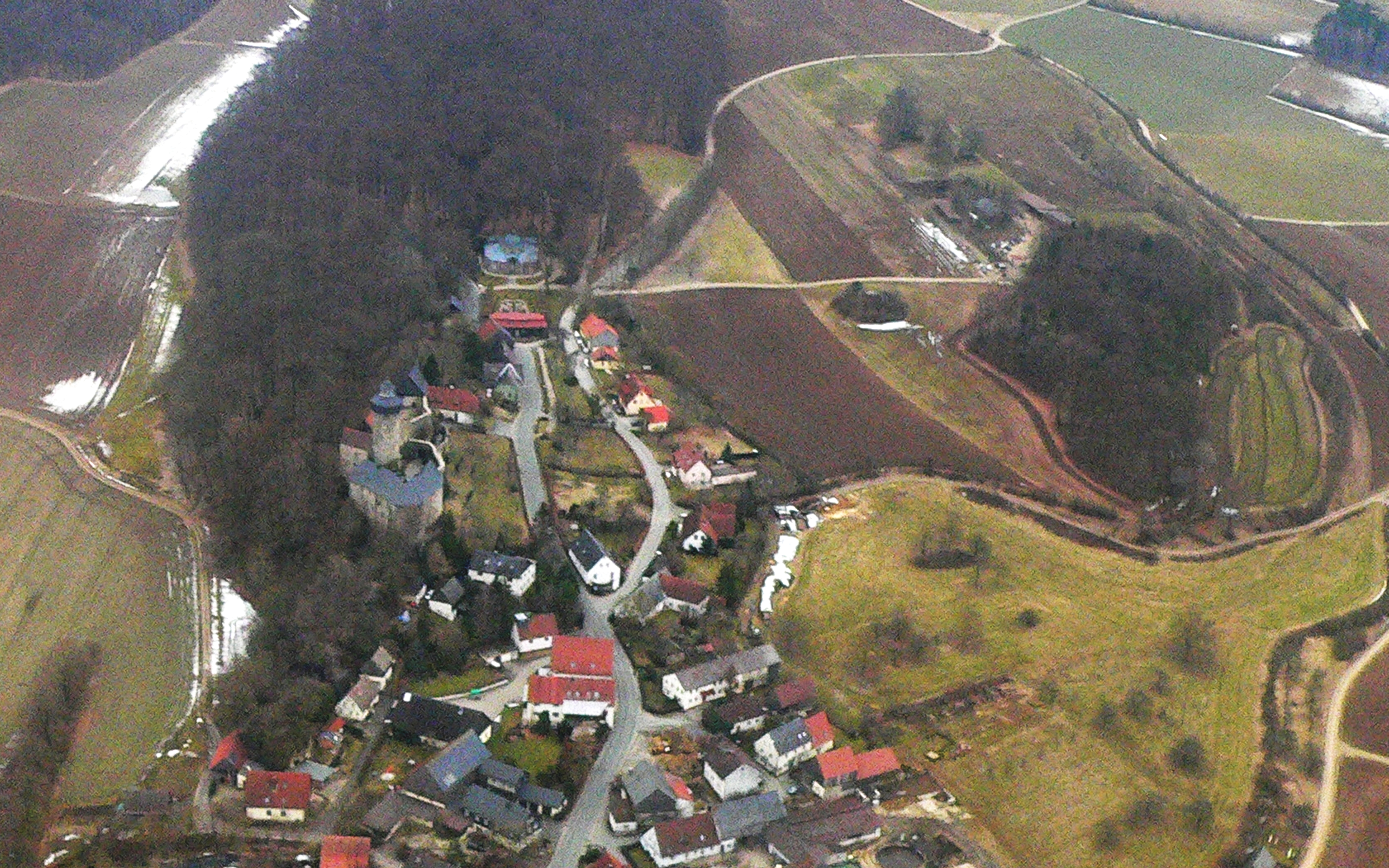 Burg Zwernitz und Felsengarten Sanspareil aus westlicher Ansicht